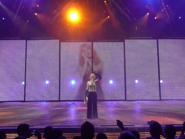 KylieX2008